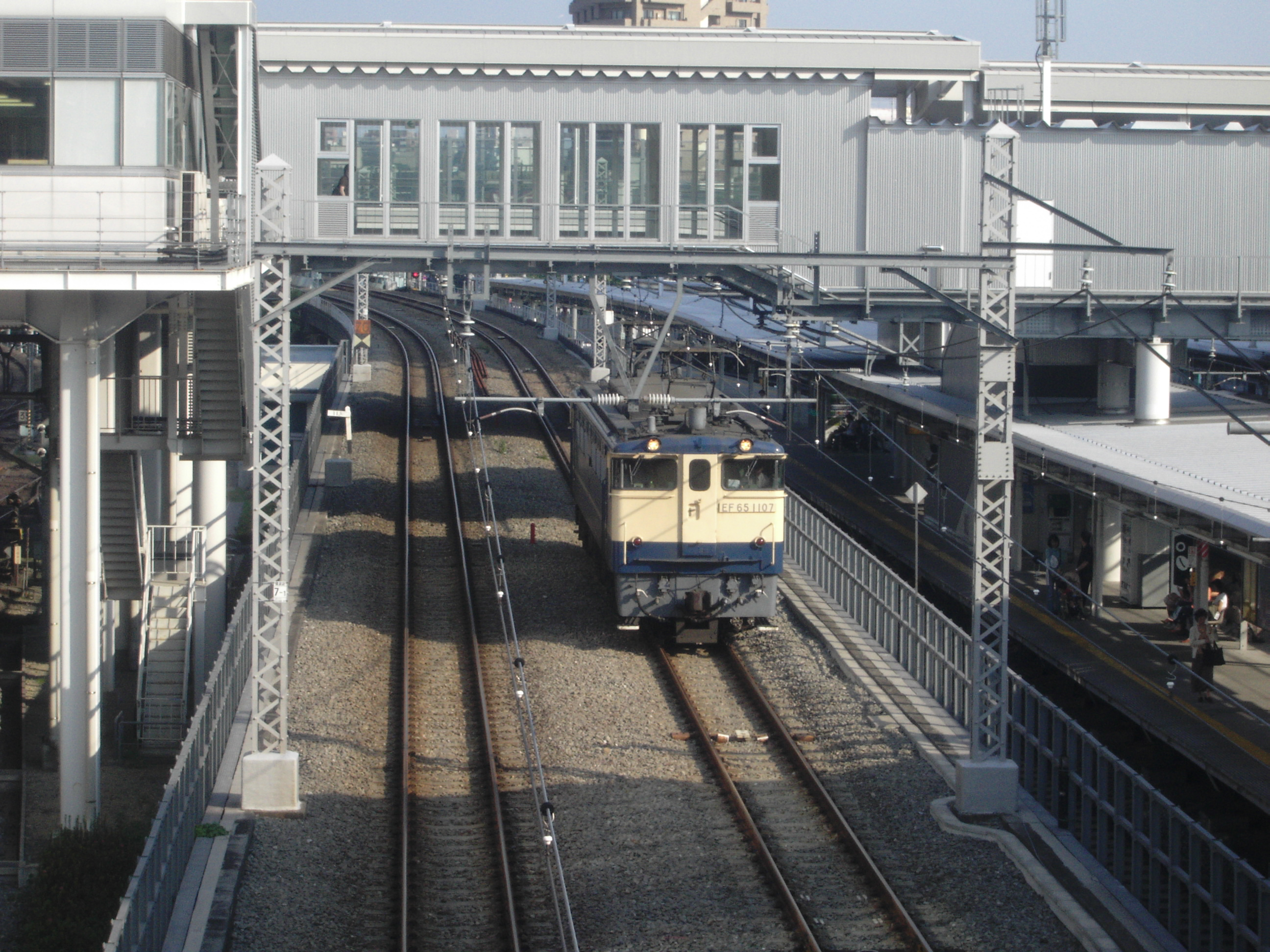 山手線ホームと埼京線・湘南新宿ライン・りんかい線のホームの間にある品鶴線のデルタ線に停車中のEF65-1107